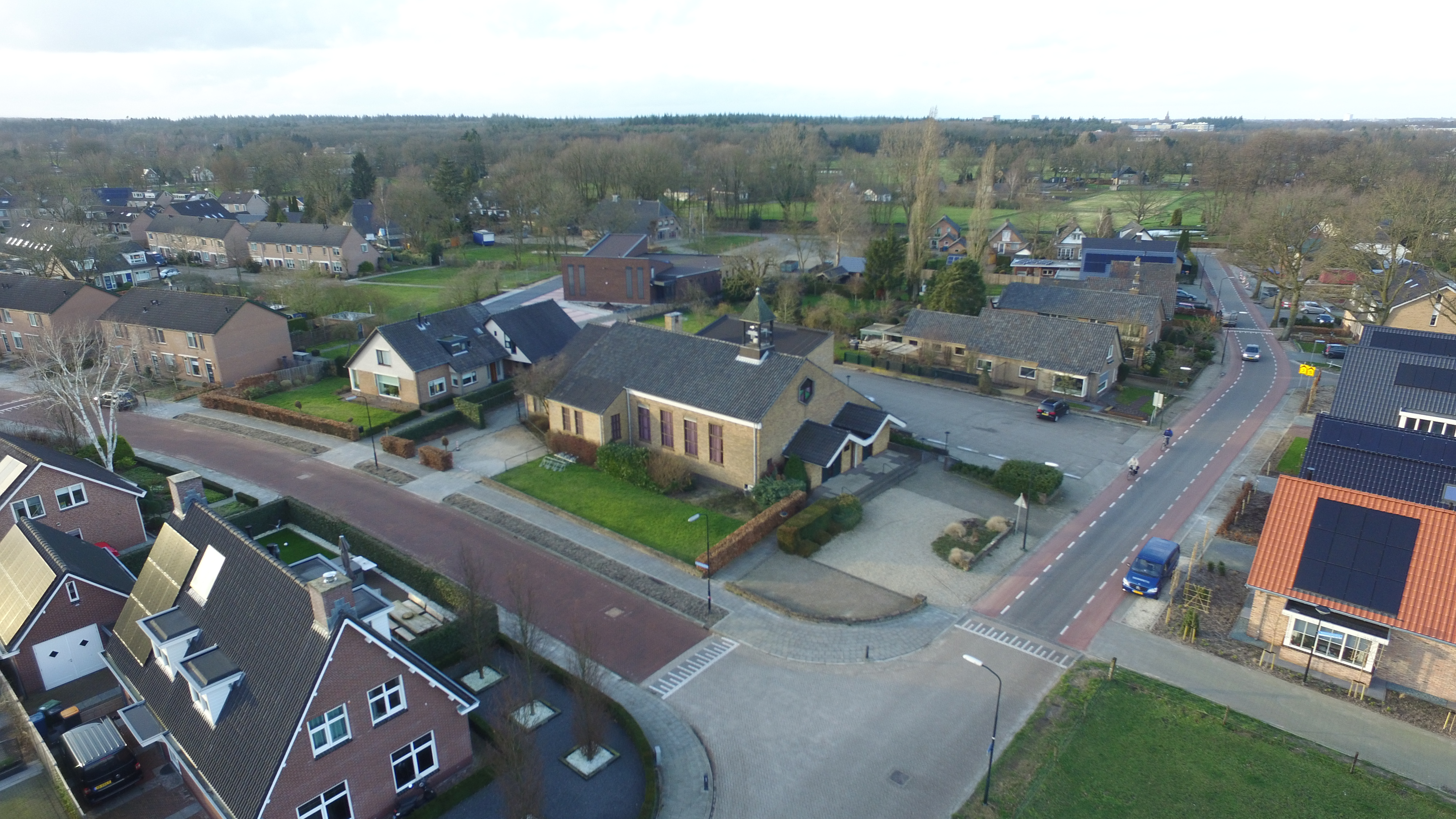 Luchtfoto van de oude kerk zoals deze tot en met 23 februari 2020 in gebruik was. Links achter de kerk is de pastorie te zien, daarachter staat het nieuwe zalencentrum 'De Akker'